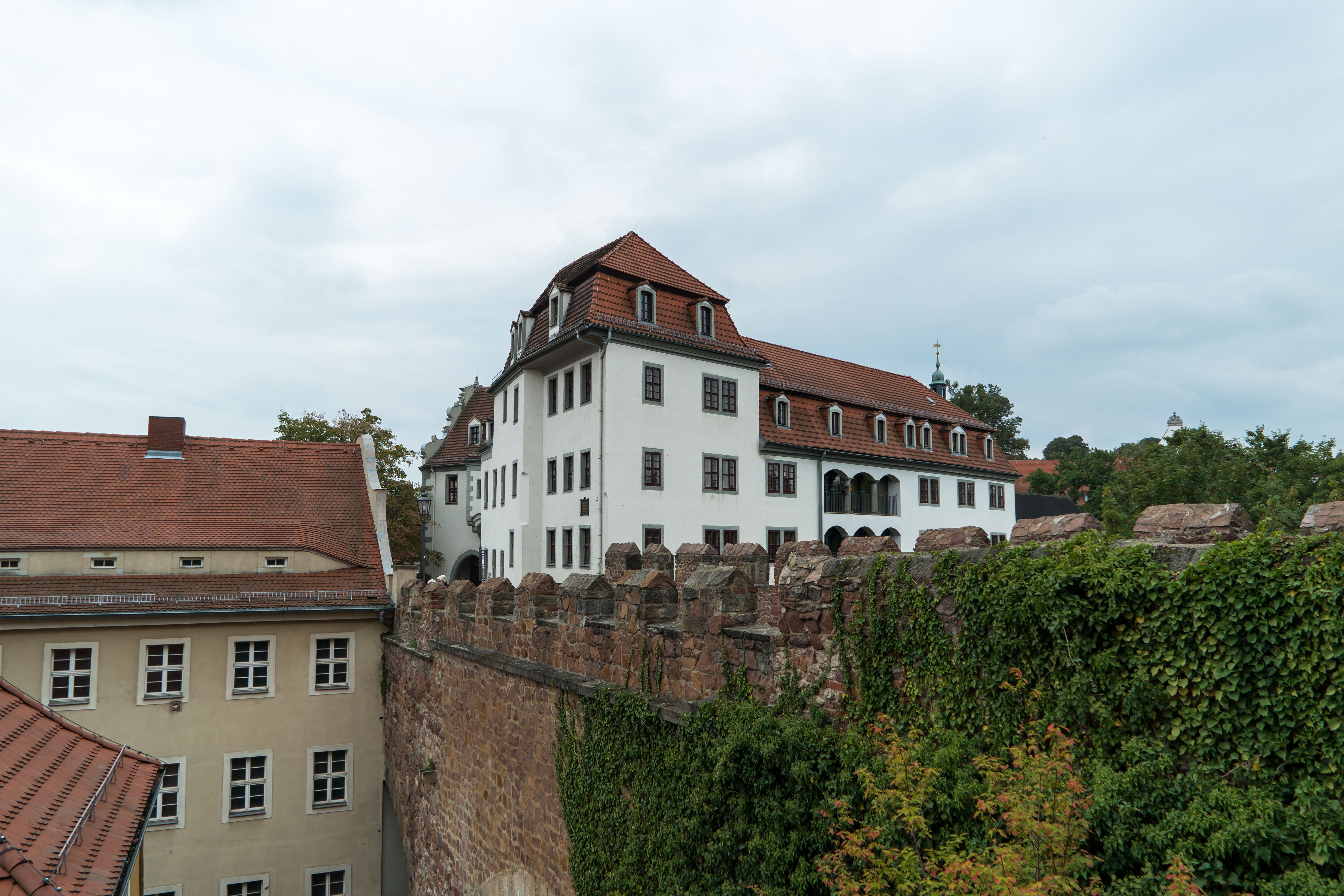 Schleinitzer Hof, ehemaliger Adelsfreihof und Burglehenhaus mit Vorderem Burgtor in Meißen